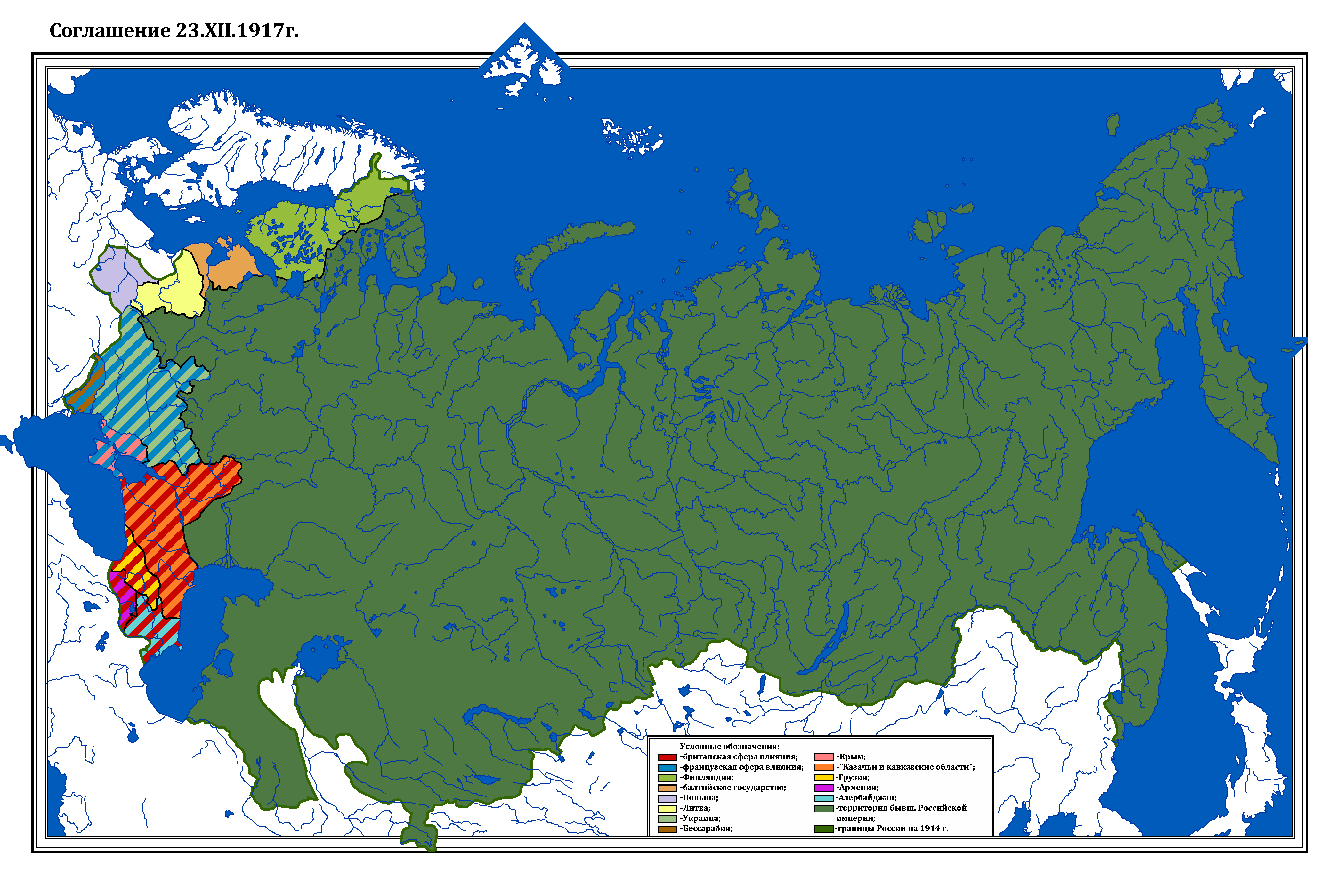 Франко-английское соглашение о разделе сфер ответственности в России от 23 декабря 1917 года.